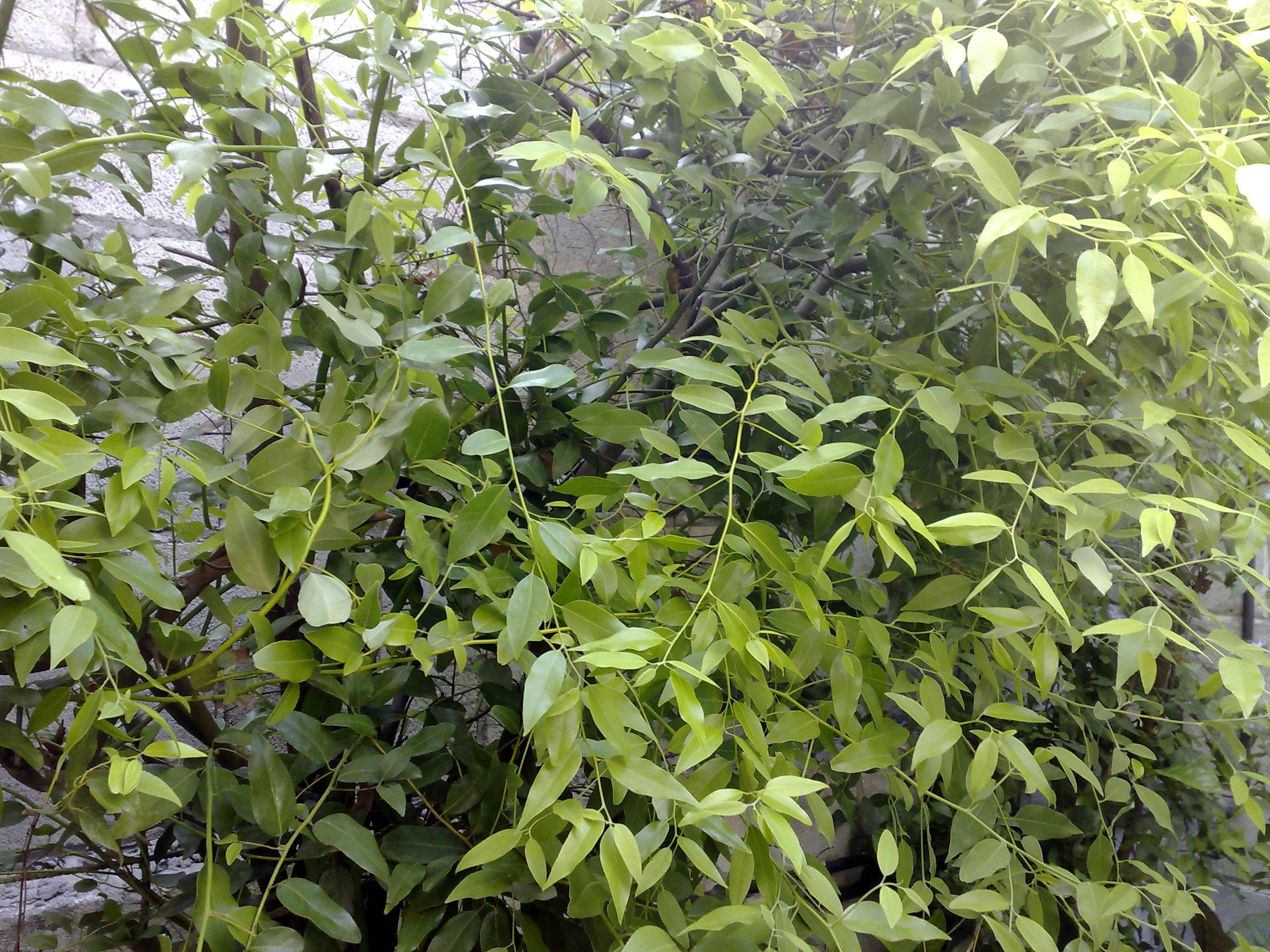 Litsea glaucescens (laurel silvestre)